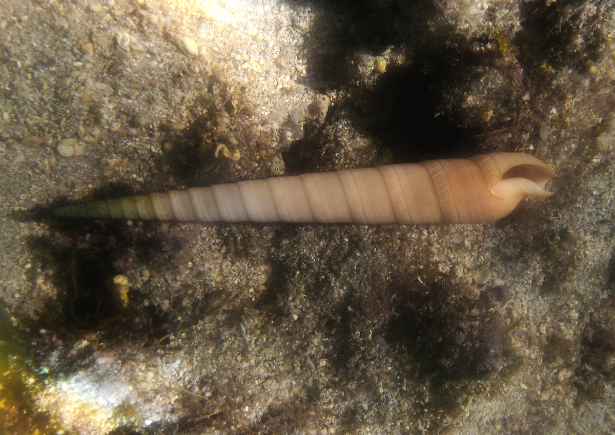 Terebra cingulifera à la Réunion.